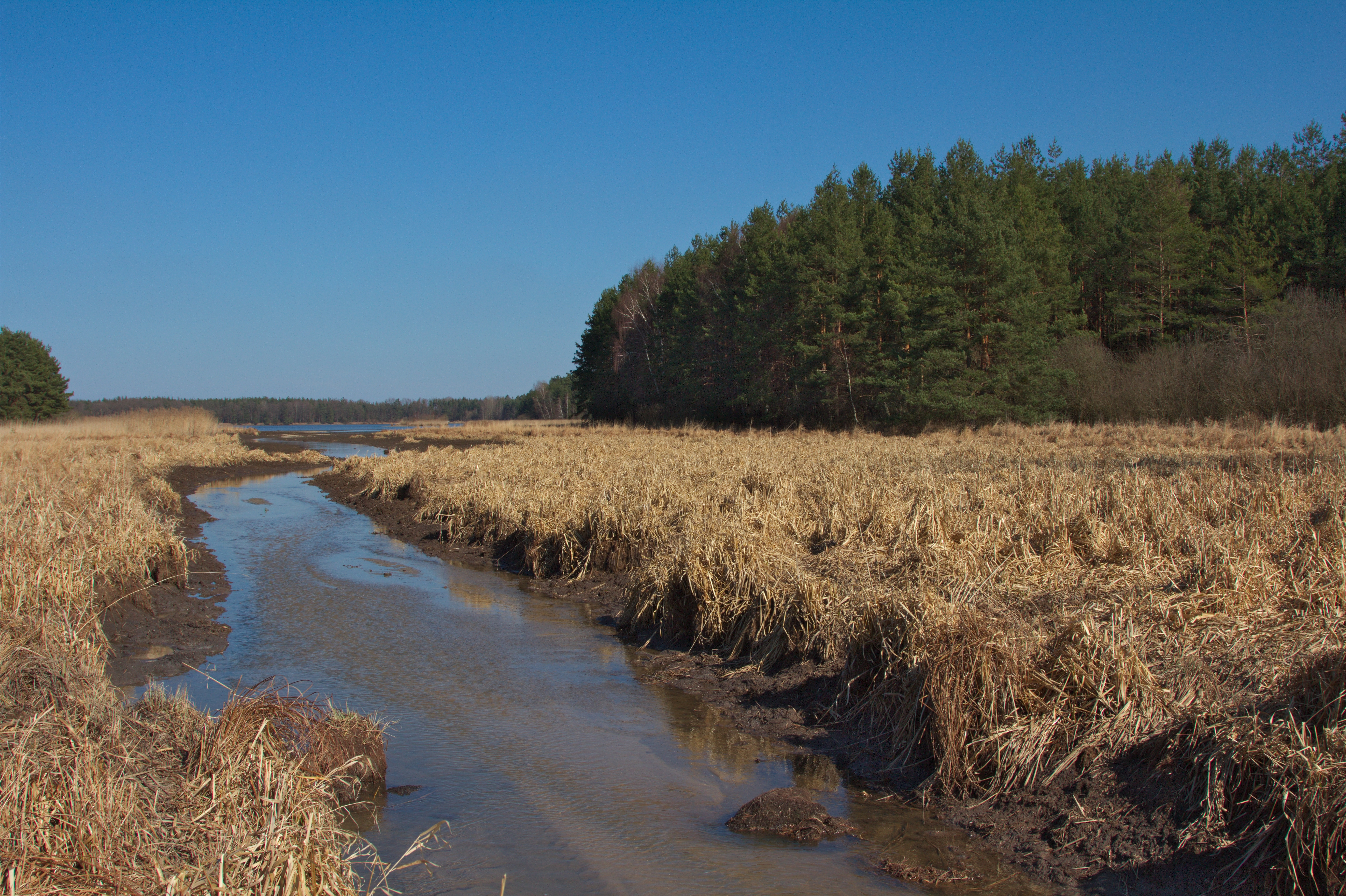 PR Ruda u Kojákovic, Opatovická stoka